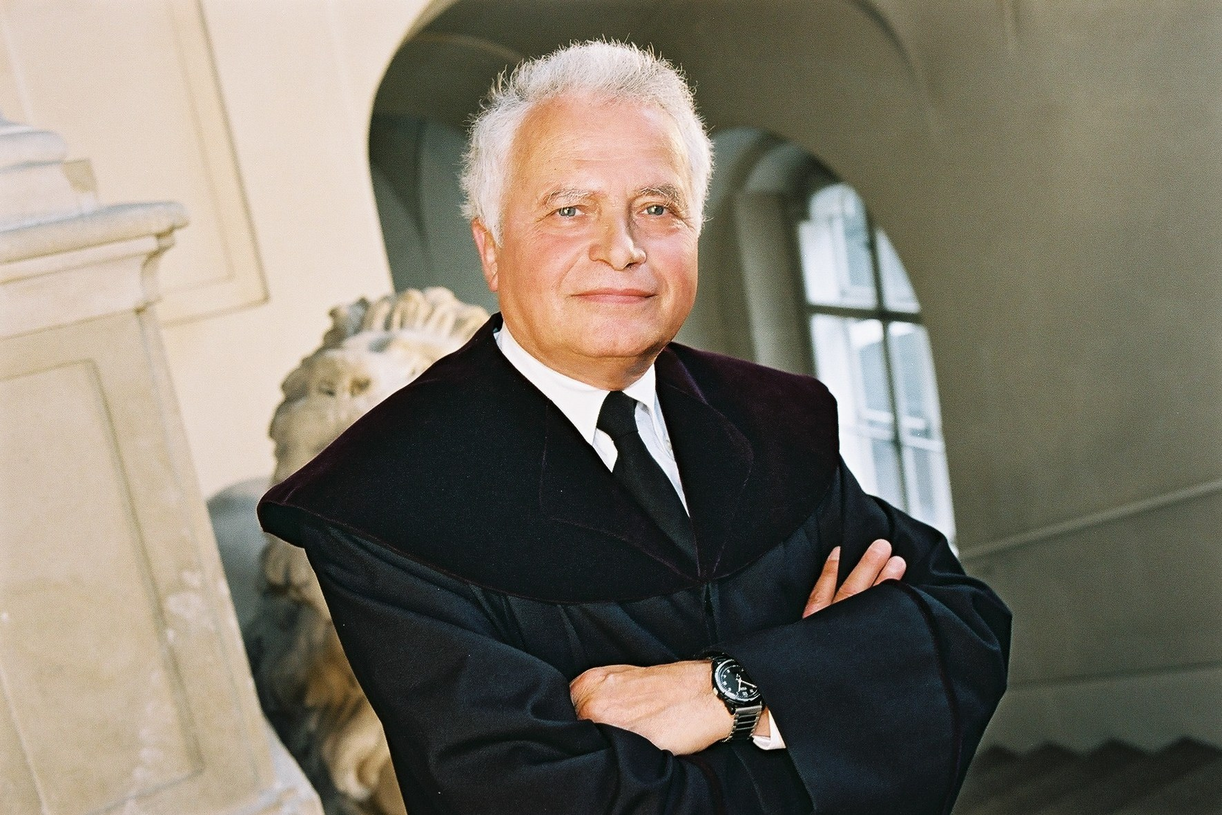 Dr. Willibald Liehr war ein österreichischer Jurist und Verfassungsrichter. Hier auf einem Bild aus dem Jahr 2003.